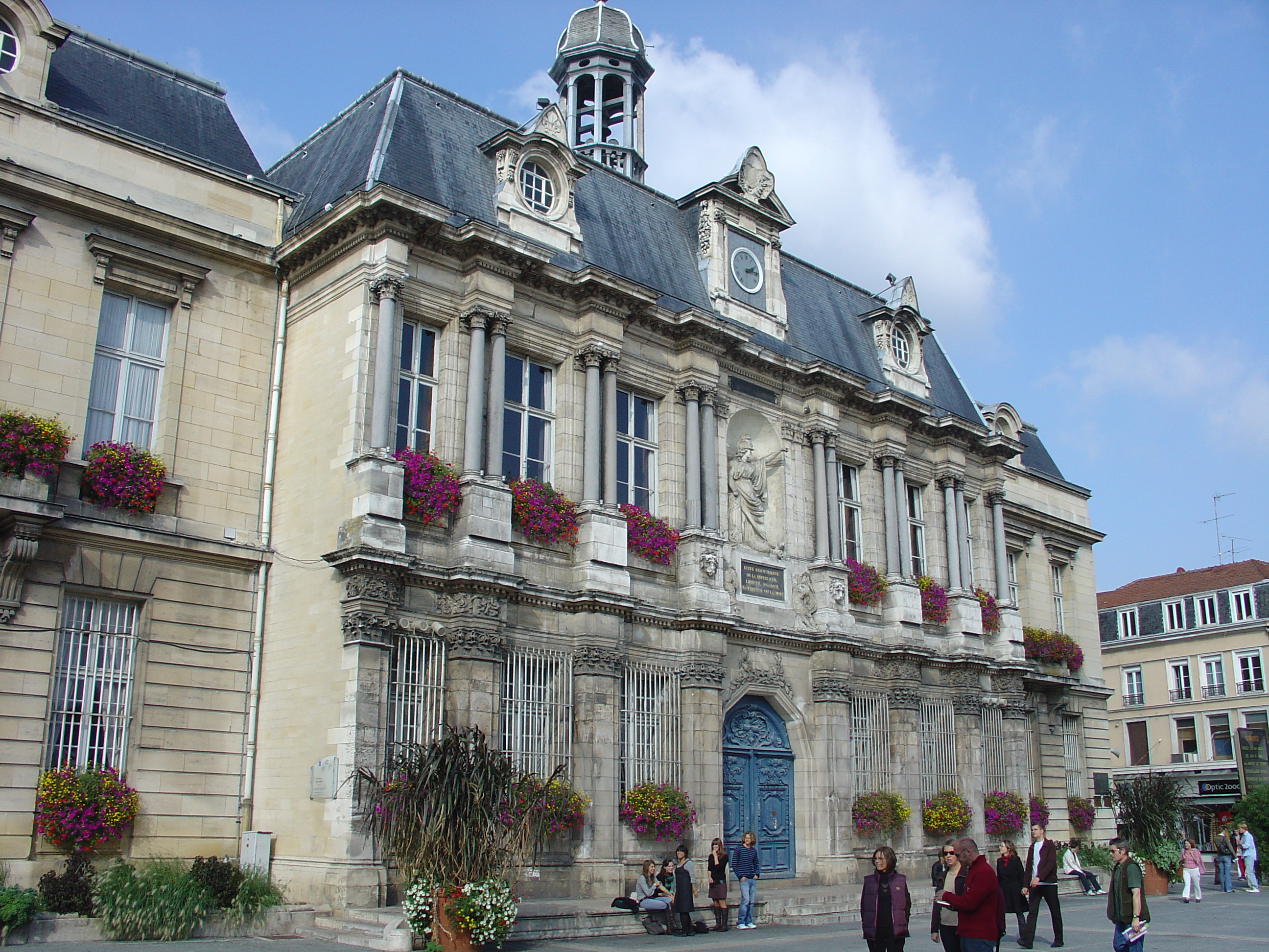 stadhuis van Troyes (Frankrijk)